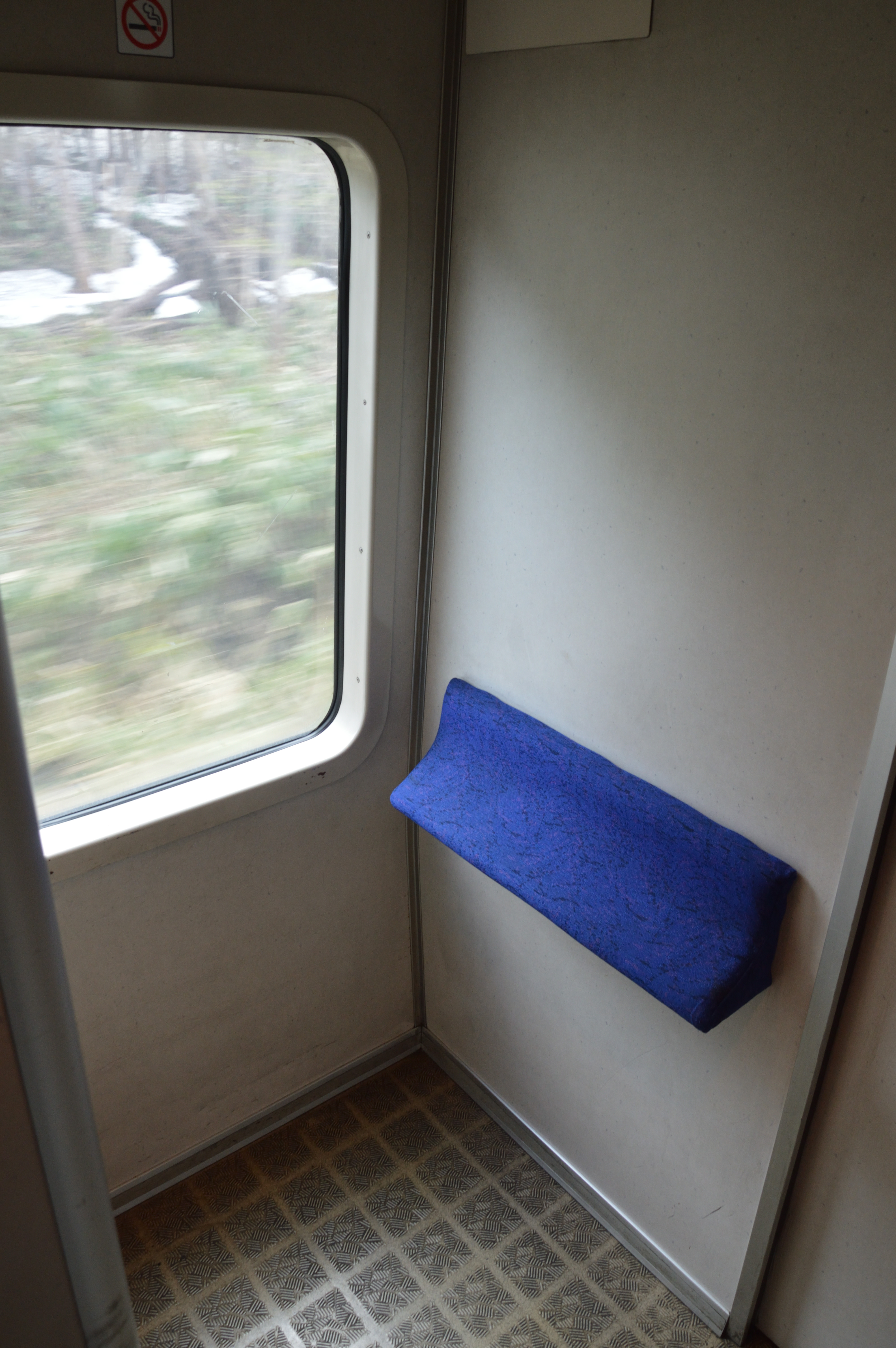 キロハ261-201のグリーン客室と普通客室の間に設けられたフリースペース。元は喫煙スペースであった。